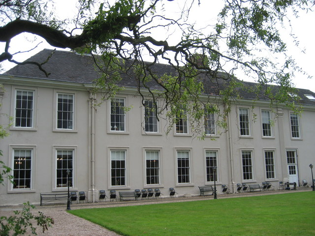 Front Facade Middleton Hall